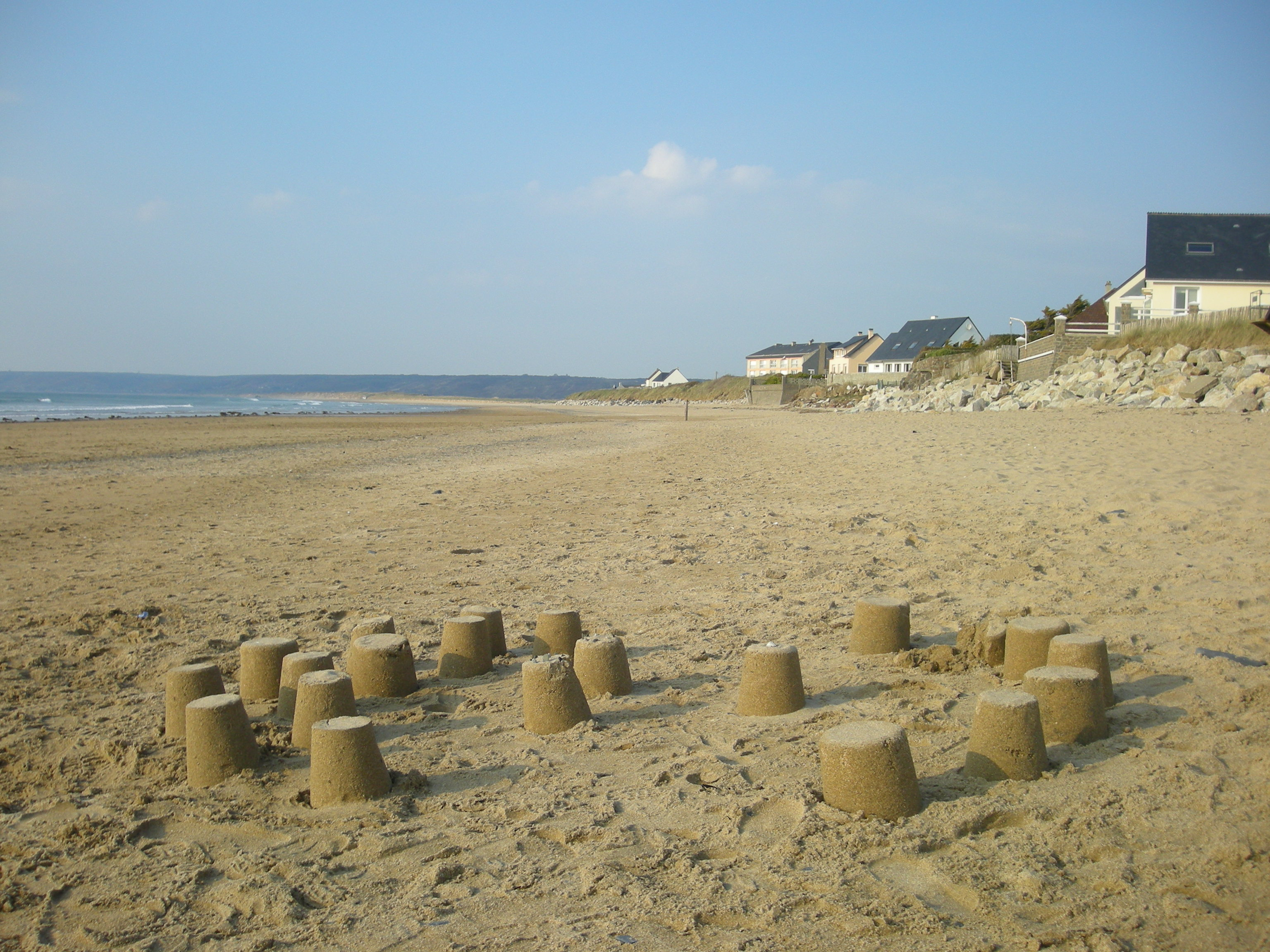 La plage à Siouville-Hague (Manche, Normandie, France)